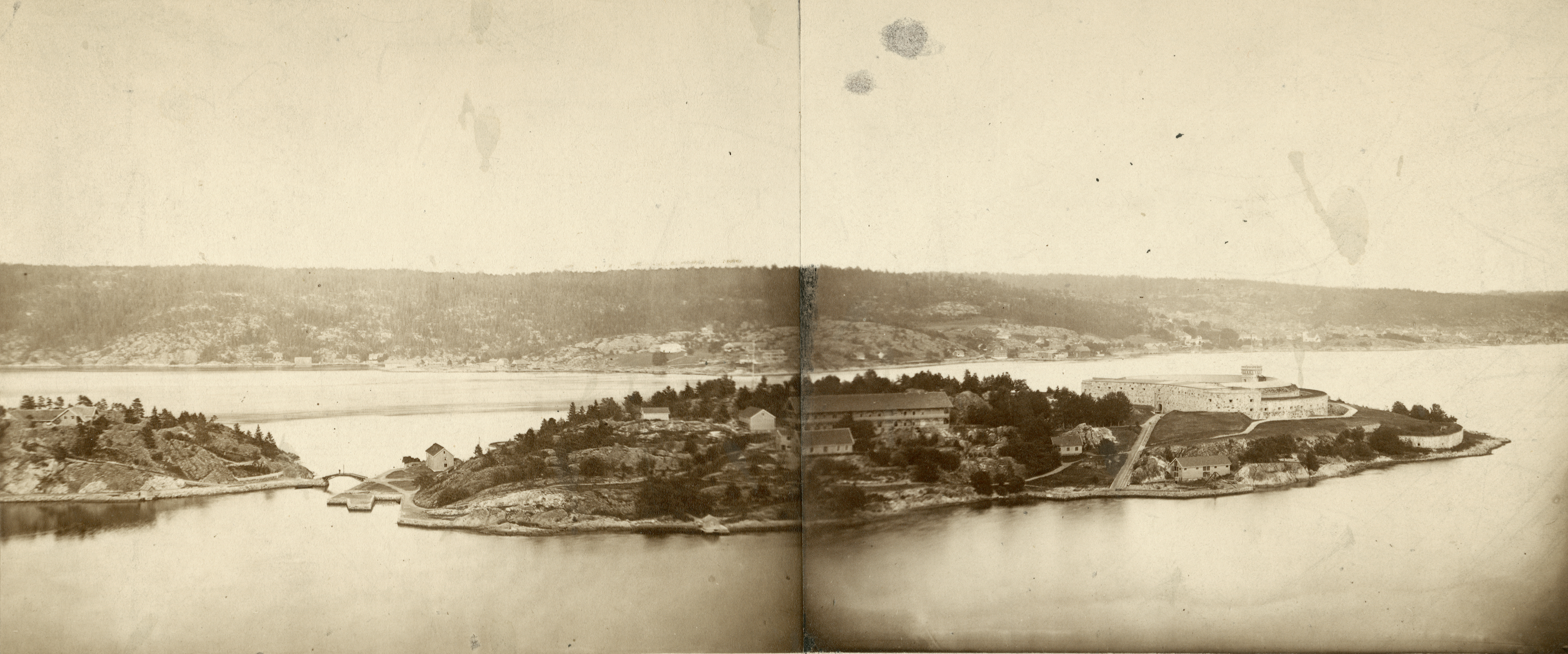 Oscarsborg i Frogn, Akershus